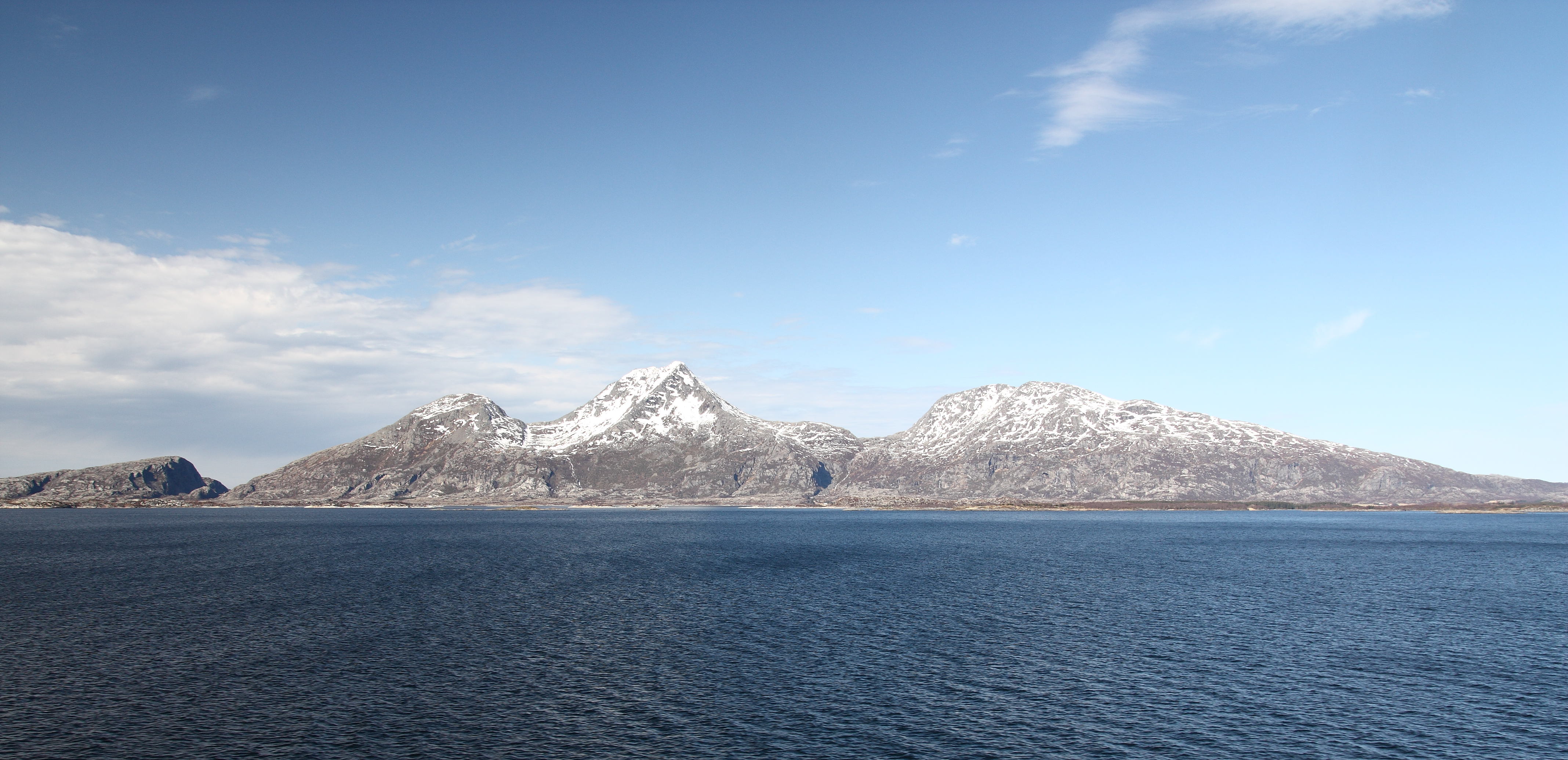 Dønnamannen (858) on Dønna, Nordland, Norway